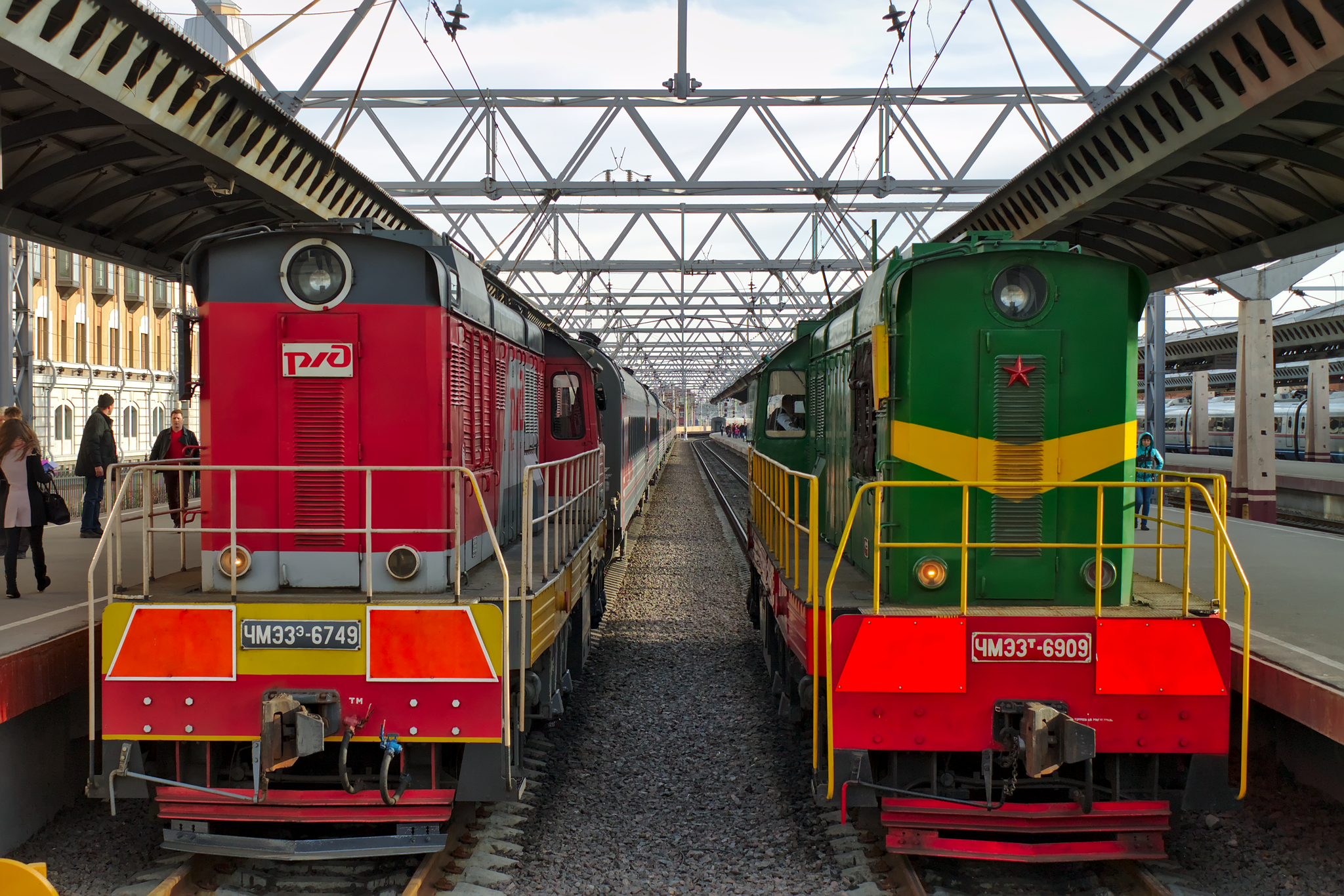 ЧМЭ3Э-6749 и ЧМЭ3Т-6909, Санкт-Петербург, Московский вокзал. см. фото 587930 в альбоме автора